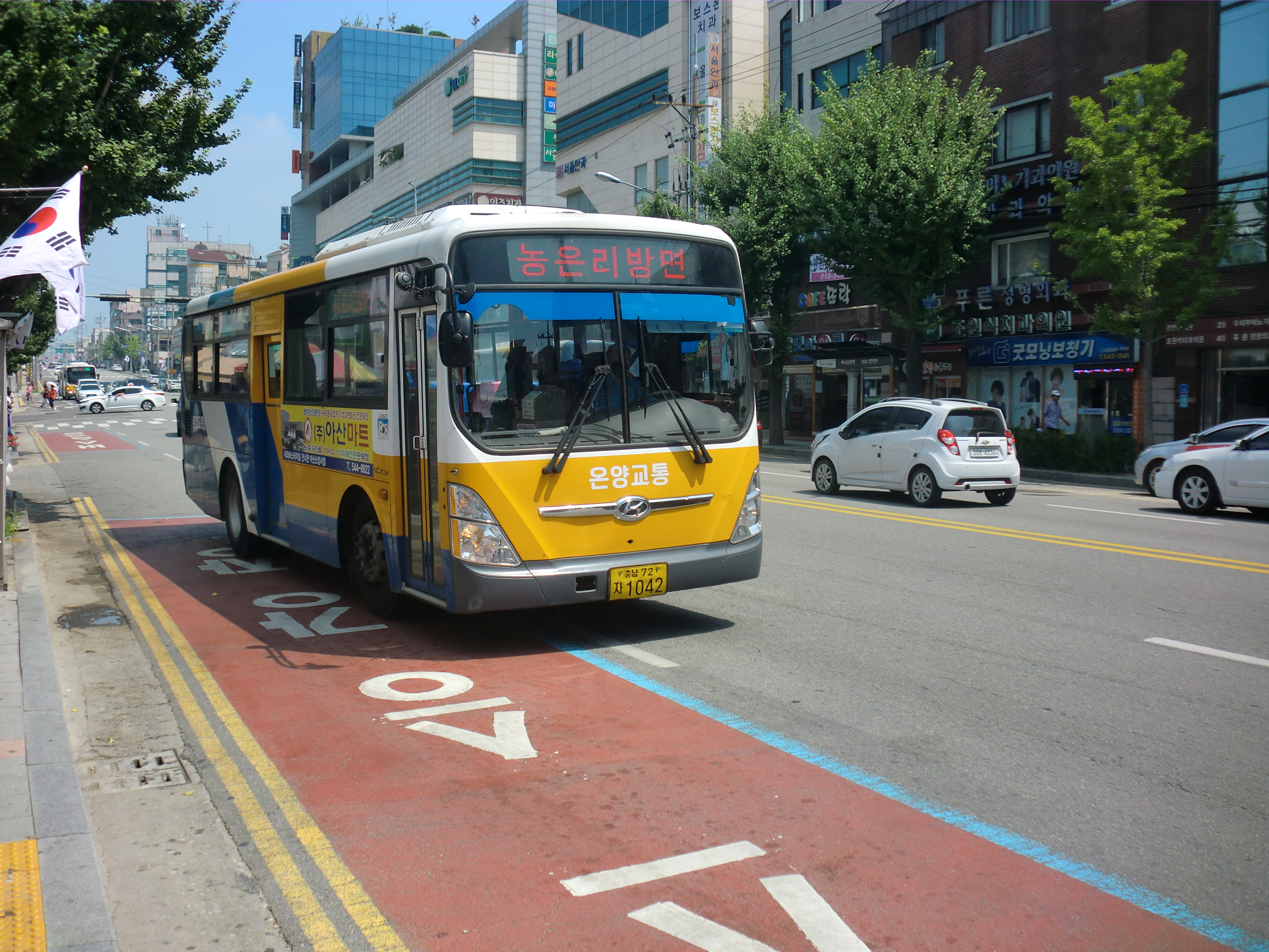 아산시내버스